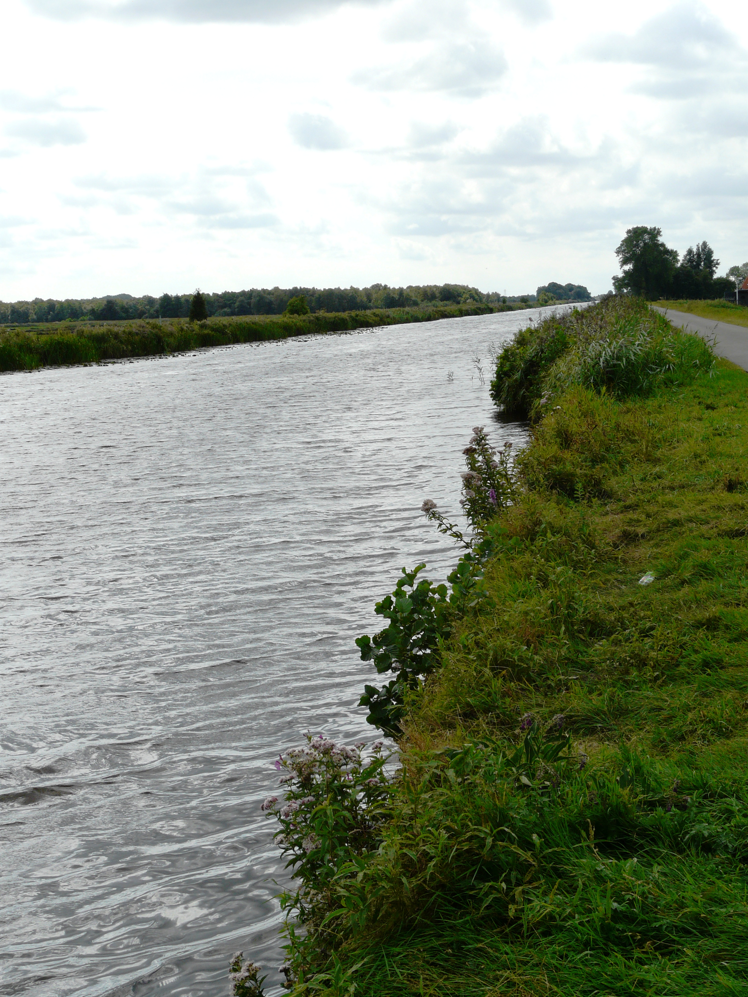 Heafeart by de Deelen